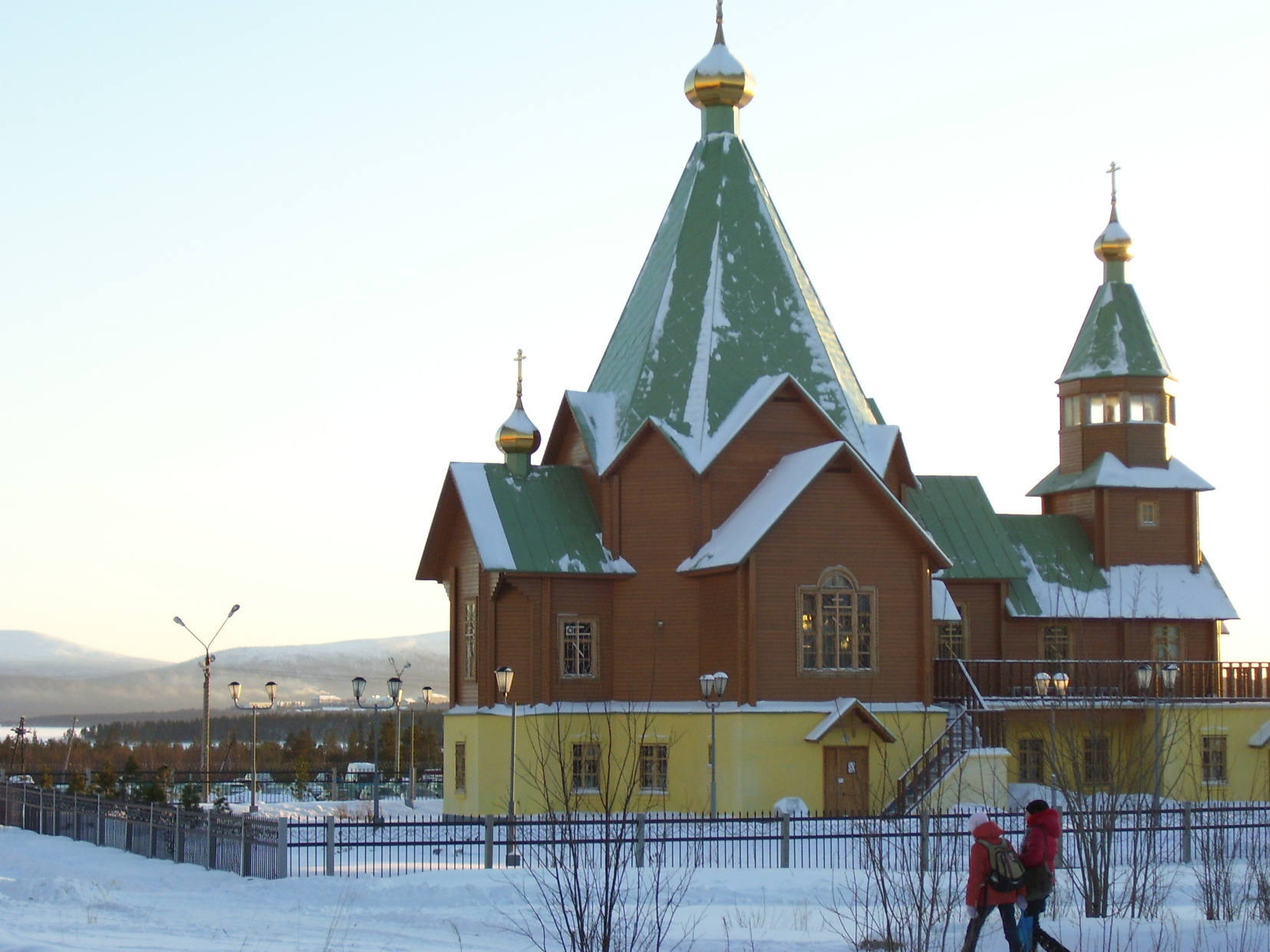 Свято-Троицкая церковь в Полярных Зорях